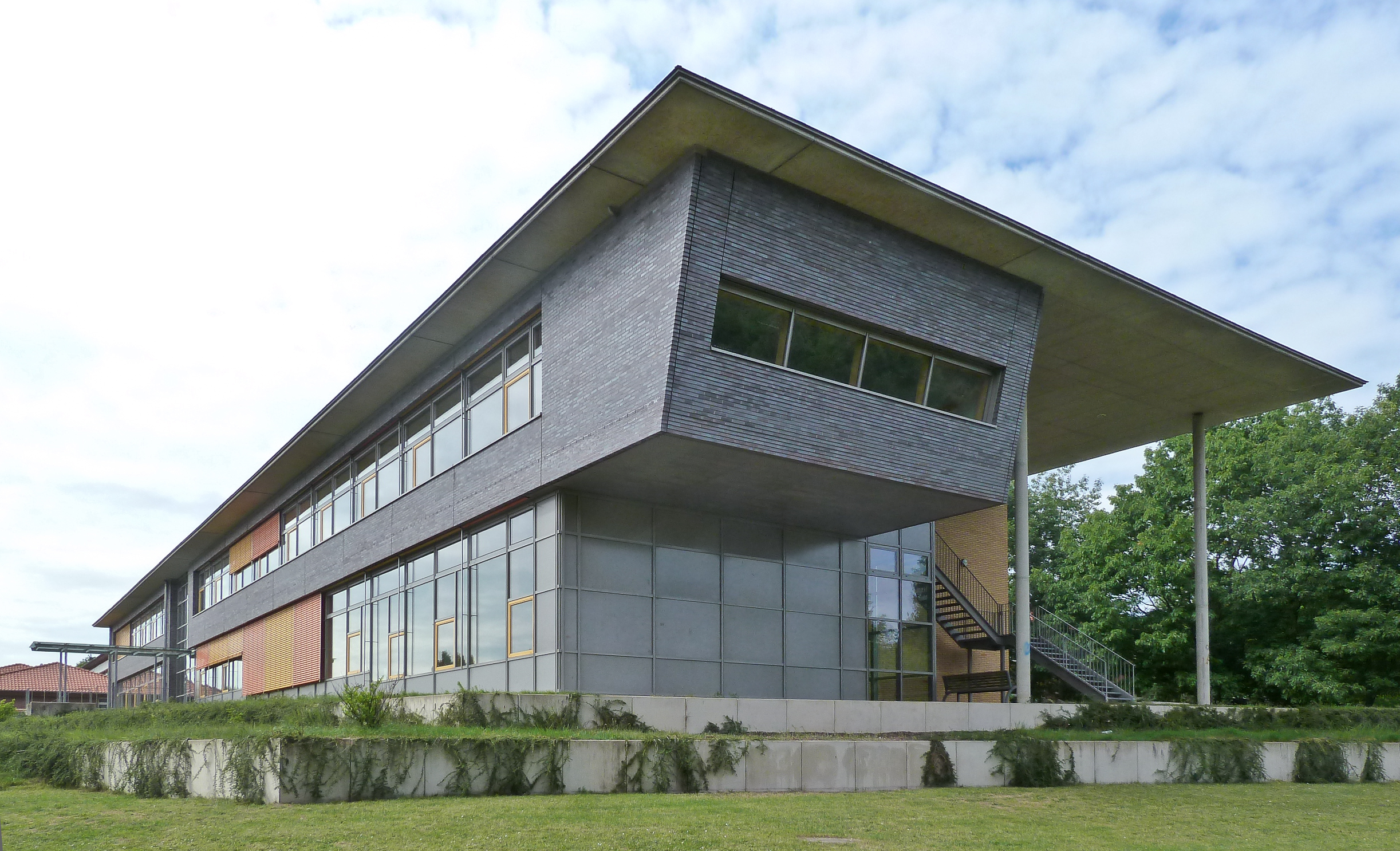 Hauptgebäude (aus südöstlicher Richtung) der Kooperativen Gesamtschule Schneverdingen in Schneverdingen in Niedersachsen (Deutschland).